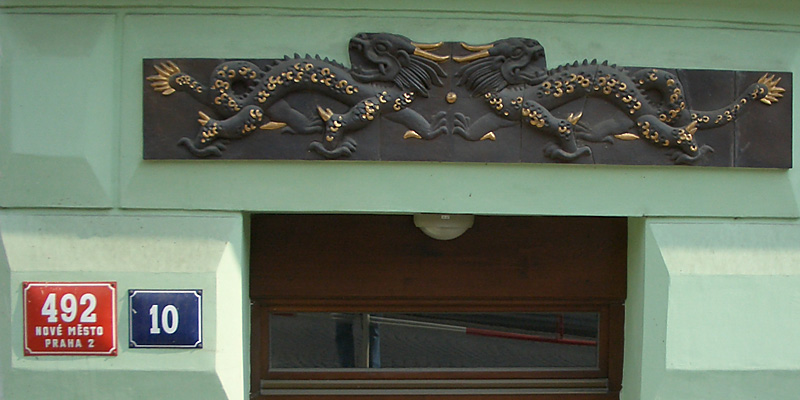 Dům U Dvou draků, Kateřinská 492/10, 128 00 Praha 2-Nové Město – detail napodobeniny domovního znamení